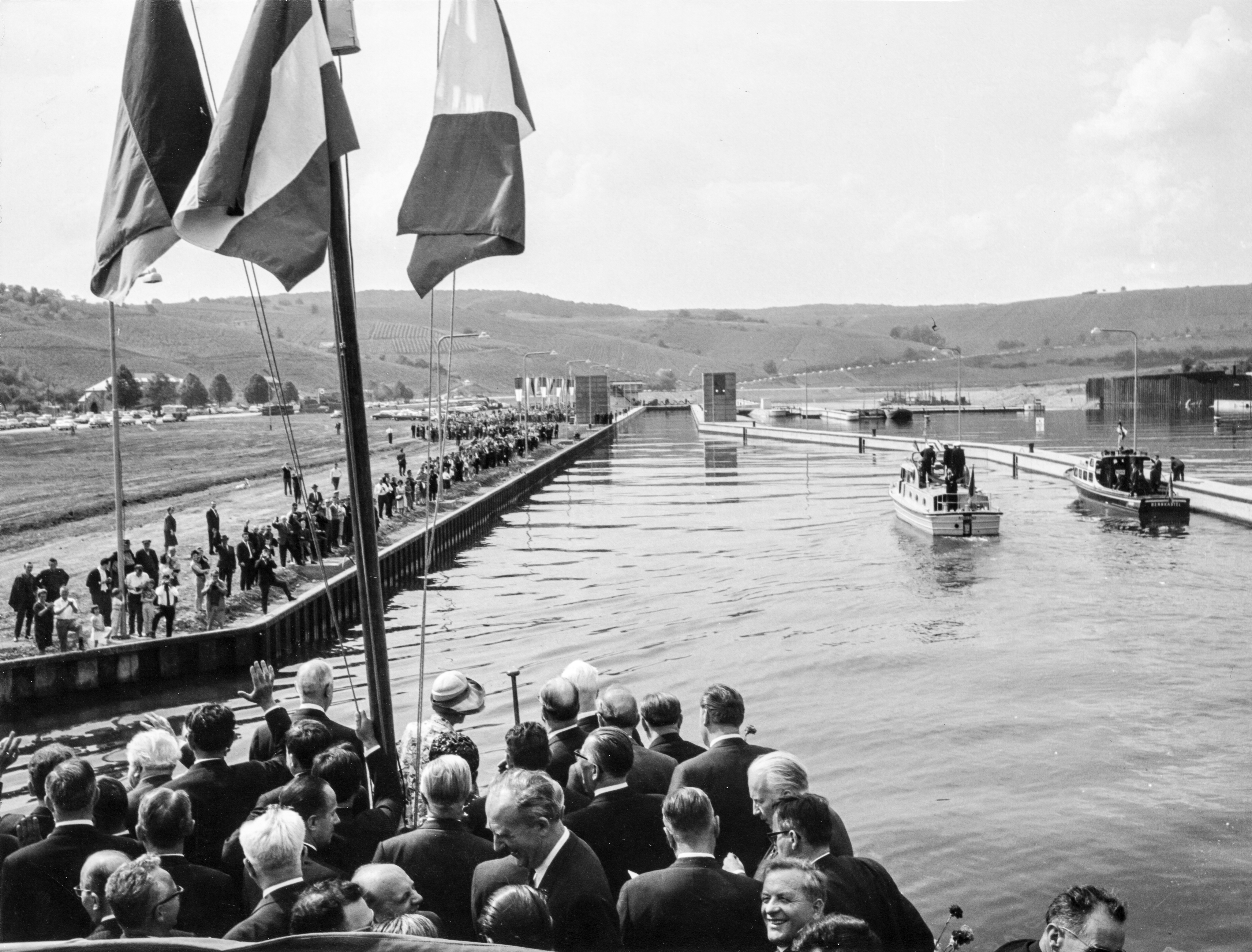 Original caption: “Einweihung des Mosel-Schifffahrtsweges 1964. (Mosel; Staatsoberhäupter; Schleuse Palzem) ”